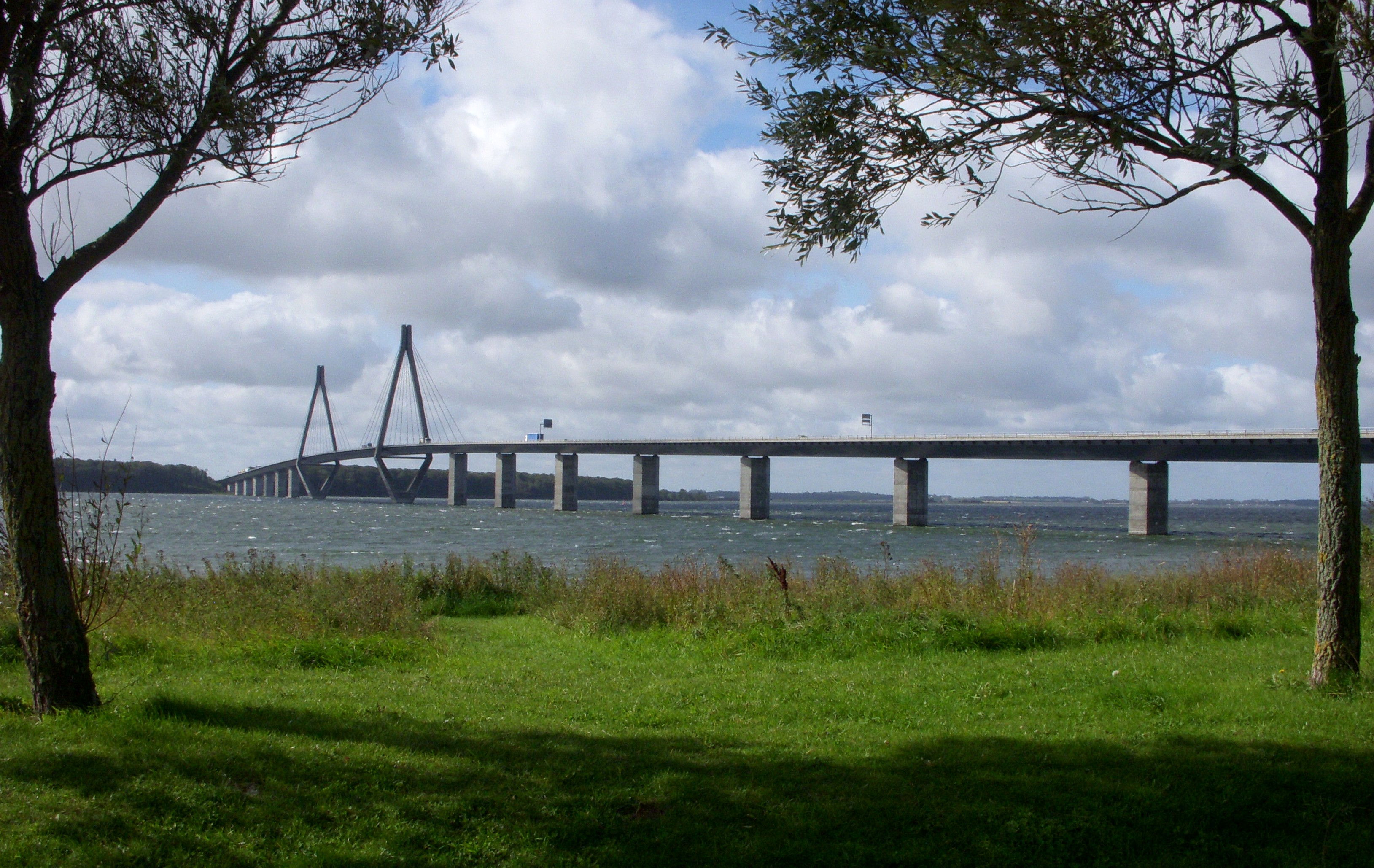 Faröbron in Dänemark